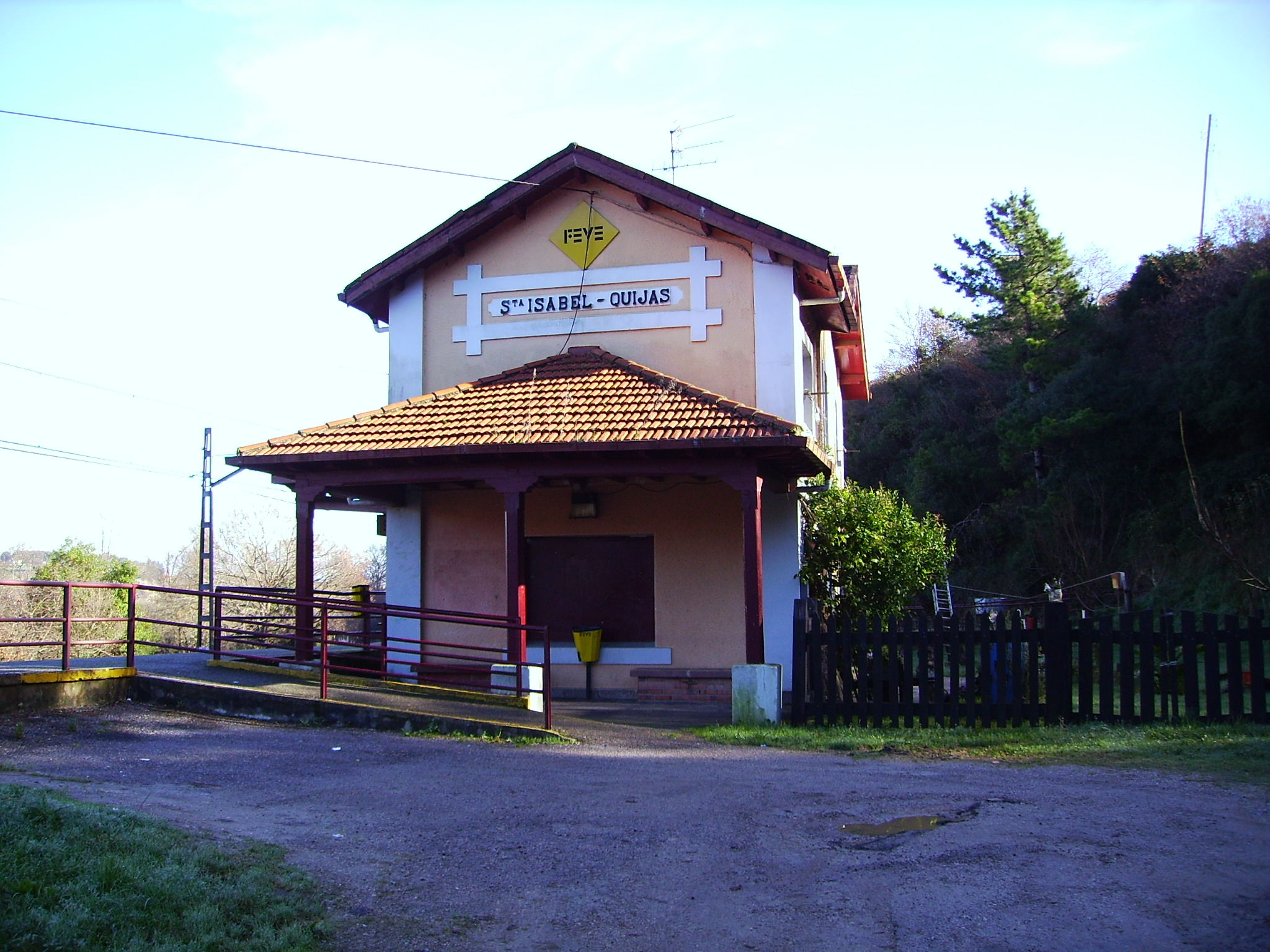 Estación de tren de Santa Isabel, Quijas, Cantabria, España